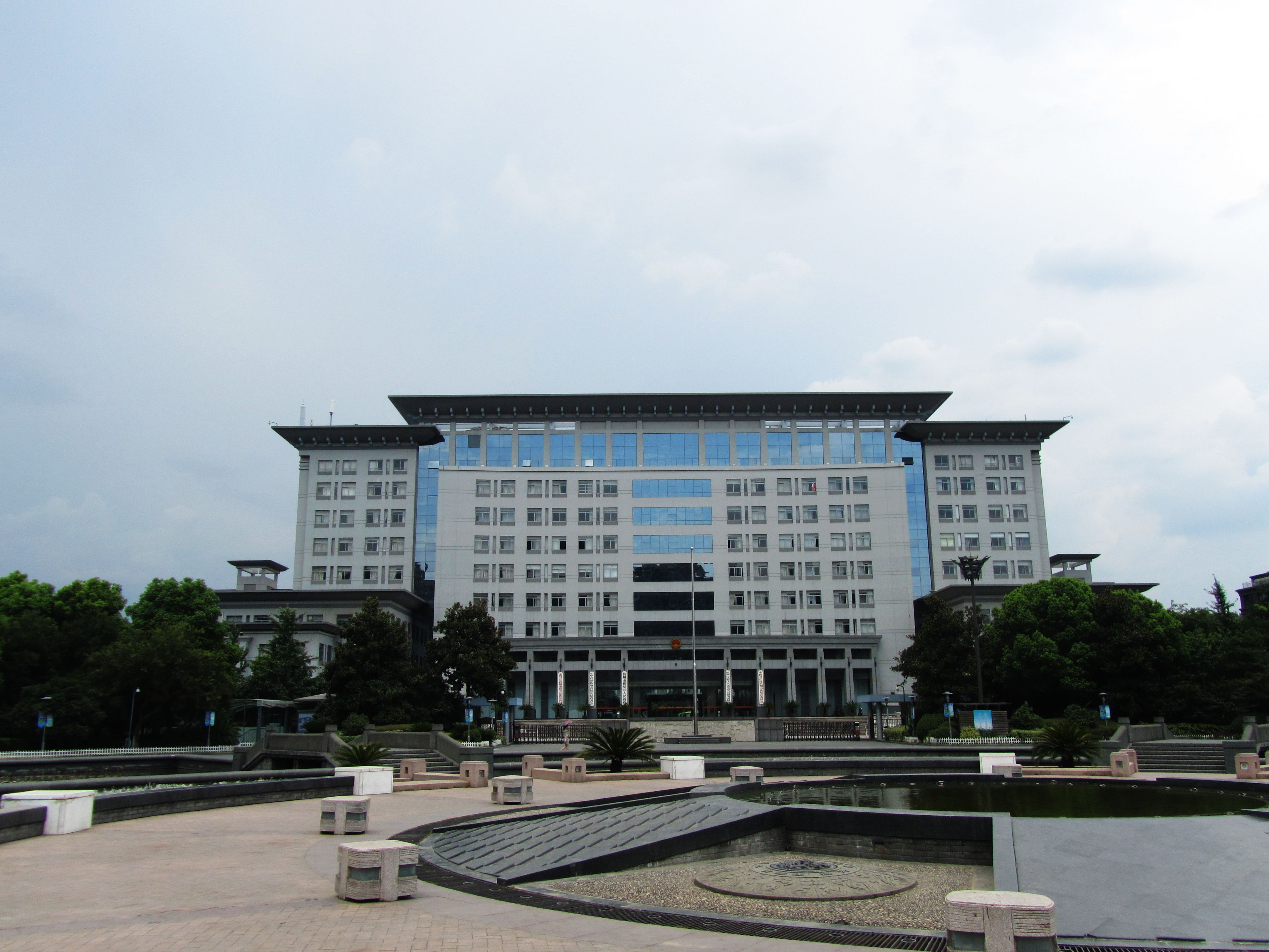 杭州市拱墅区政府大楼，位于运河广场北侧。